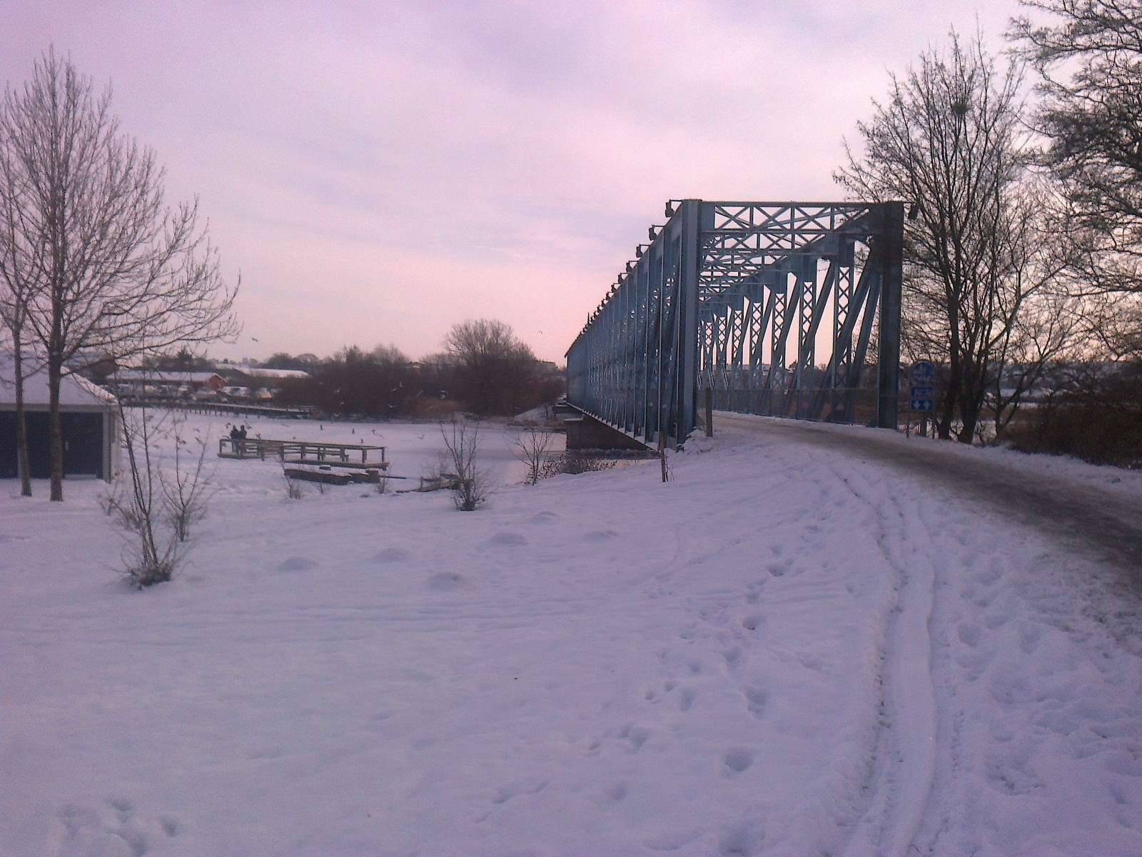 Strømmensbro over Gudenåen i Randers set fra N